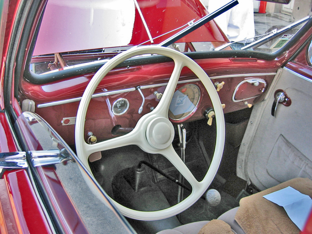 Peugeot 202 de monsieur Beucler Bernard - 25420 Bart - Franche Comté